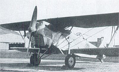 Kawasaki Ki-3 light bomber